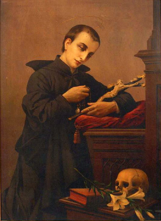 San Nicola da Tolentino Iconografia: il Santo è rappresentato in ginocchio, con la veste scura, mentre regge il crocifisso e il rosario, in basso a destra si vedono un teschio, un giglio e un libro.